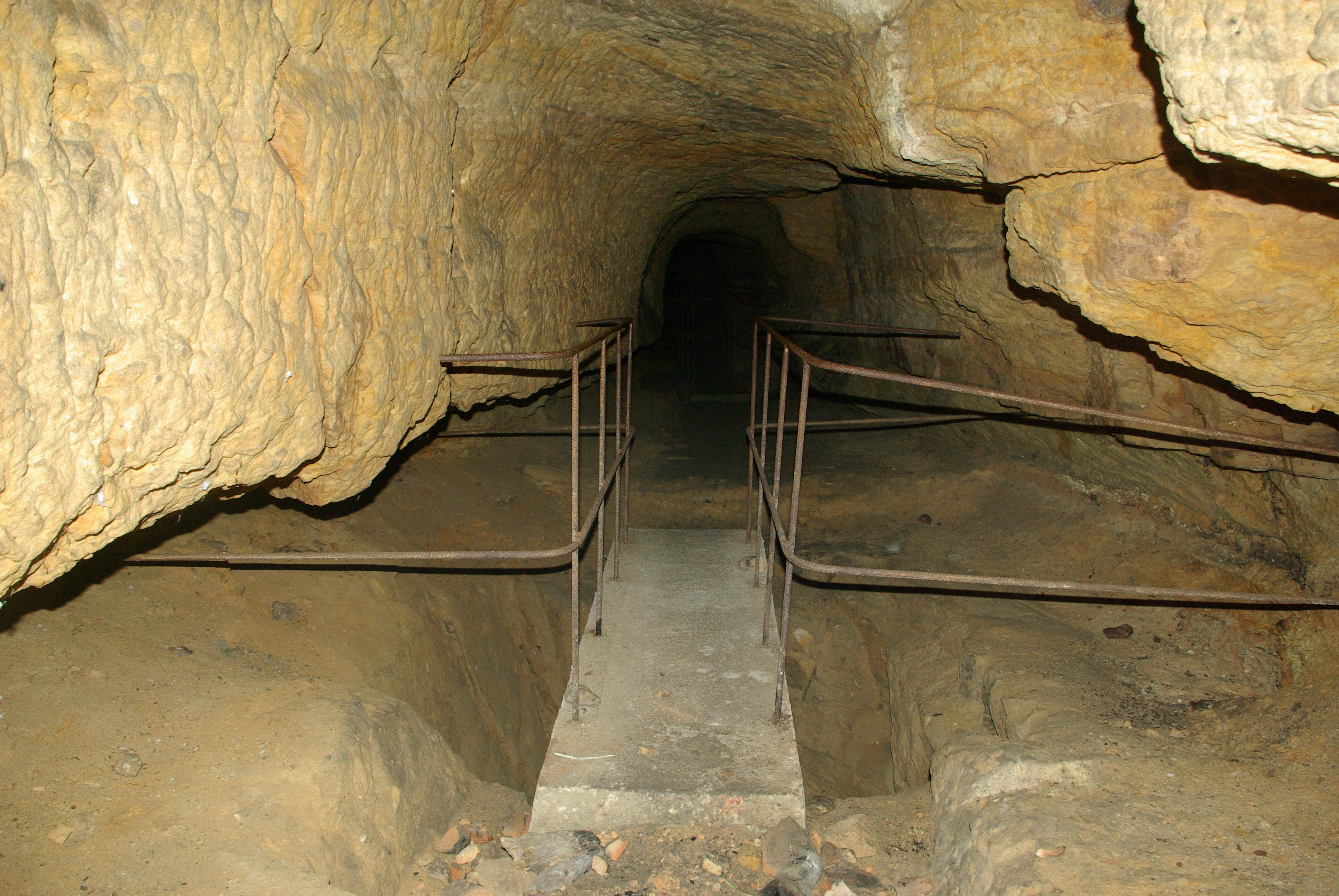 Vue de l'intérieur de la grotte du Vallon de Saint-Martin (Vosges)